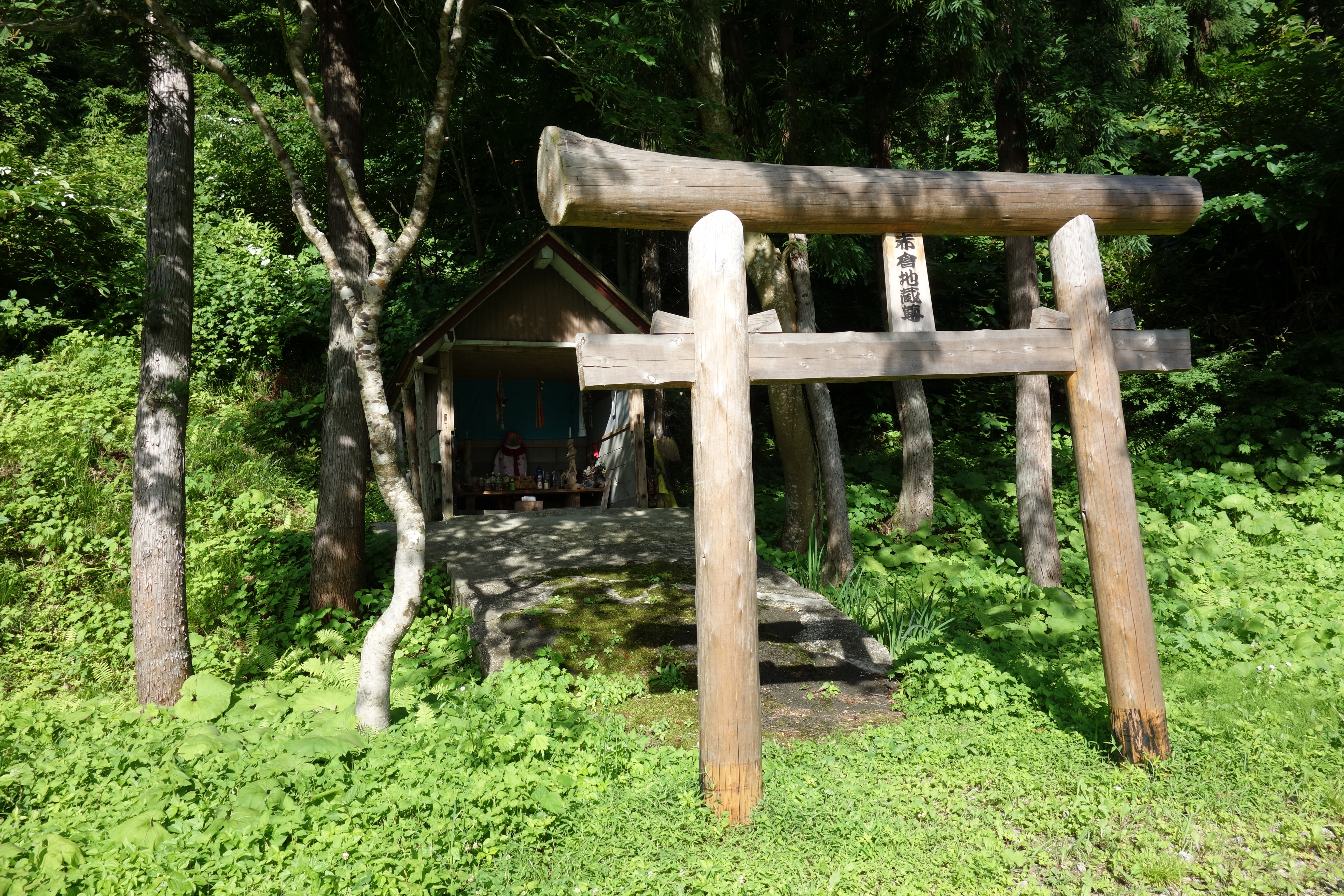 北秋田市、大覚野峠へ至る道の途中にある赤倉地蔵